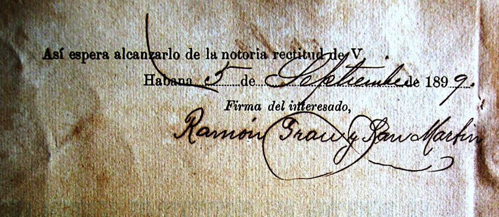 Firma de Ramóm Grau San Martín